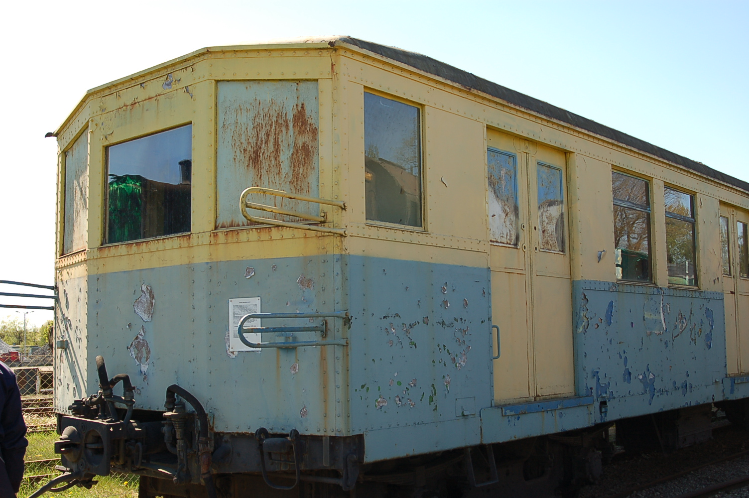 EW90 in Kościerzyna Railroad Heritage Park